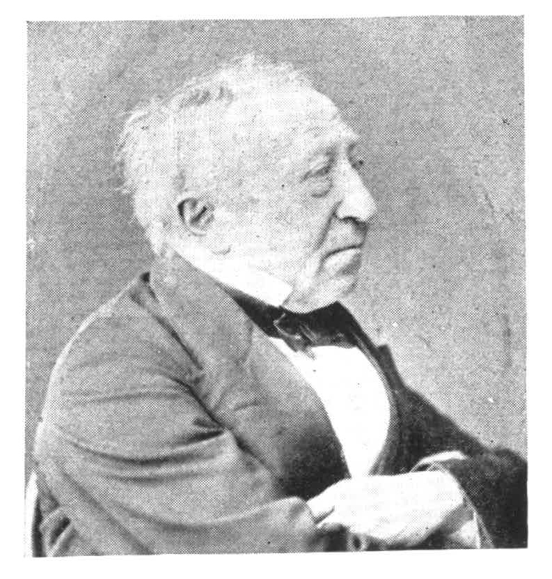 Photographie, die Oswald Lorenz (1806-1889), den Herausgeber (1. Juli bis 31. Dezember 1844) der "Neuen Zeitschrift für Musik" zeigt.